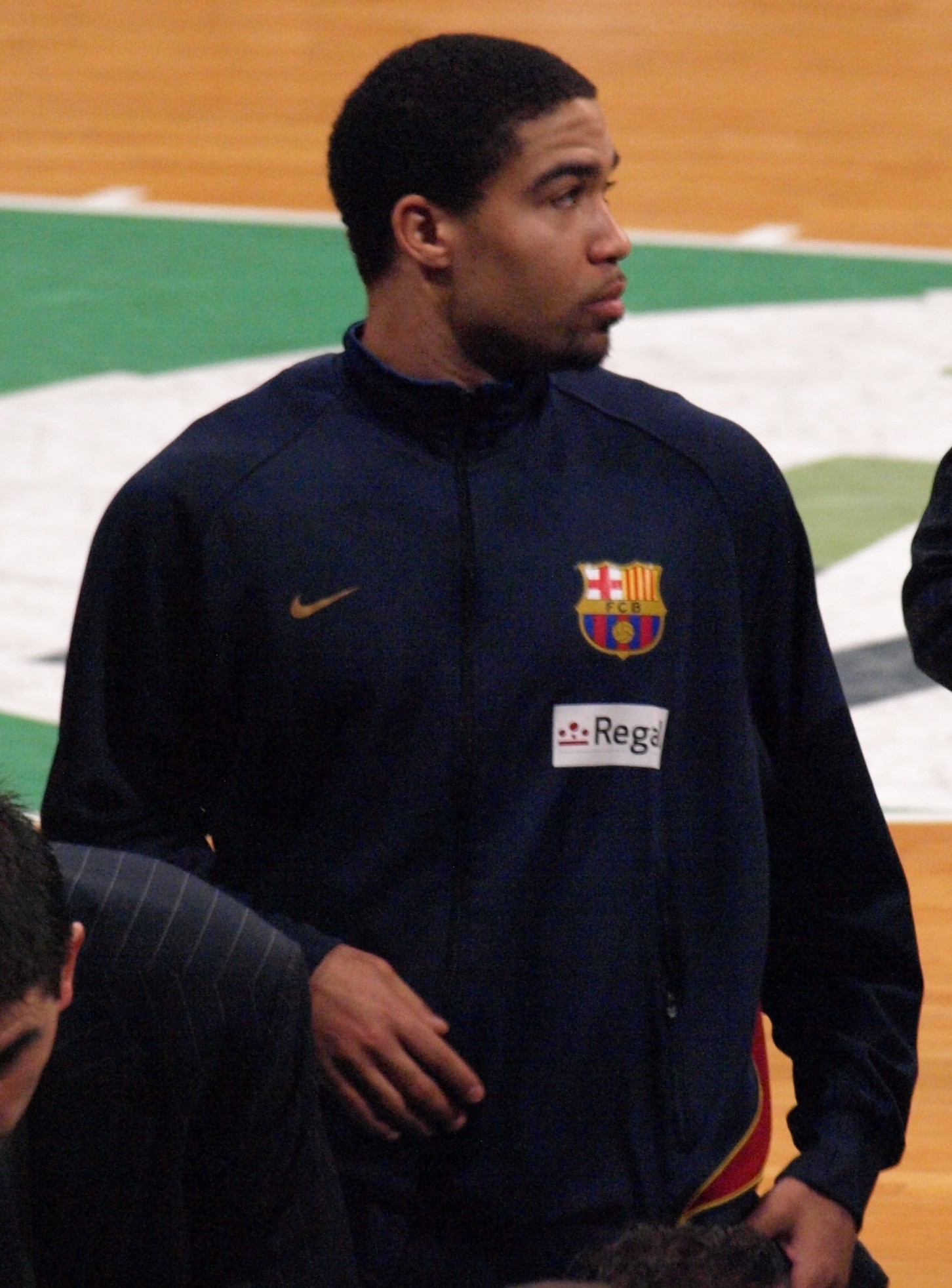 Andre Barrett, en el partido que enfrentó al FC Barcelona y al DKV Joventut de liga ACB en el Olímpico de Badalona en enero de 2009